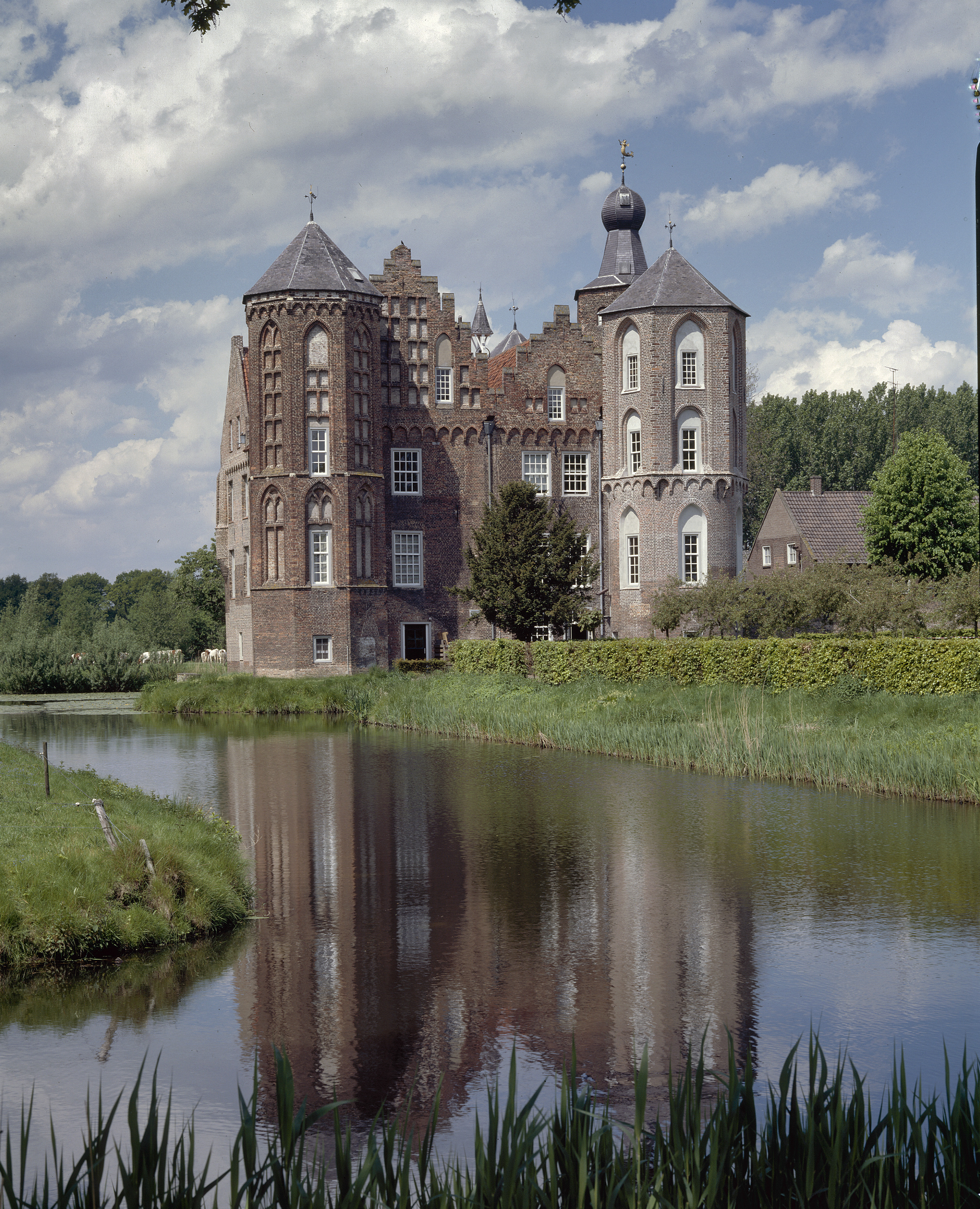 Kasteel Croy: Overzicht linker zijgevel met hoektorens en gedeelte achtergevel (opmerking: Gefotografeerd voor Monumenten In Nederland Noord-Brabant)